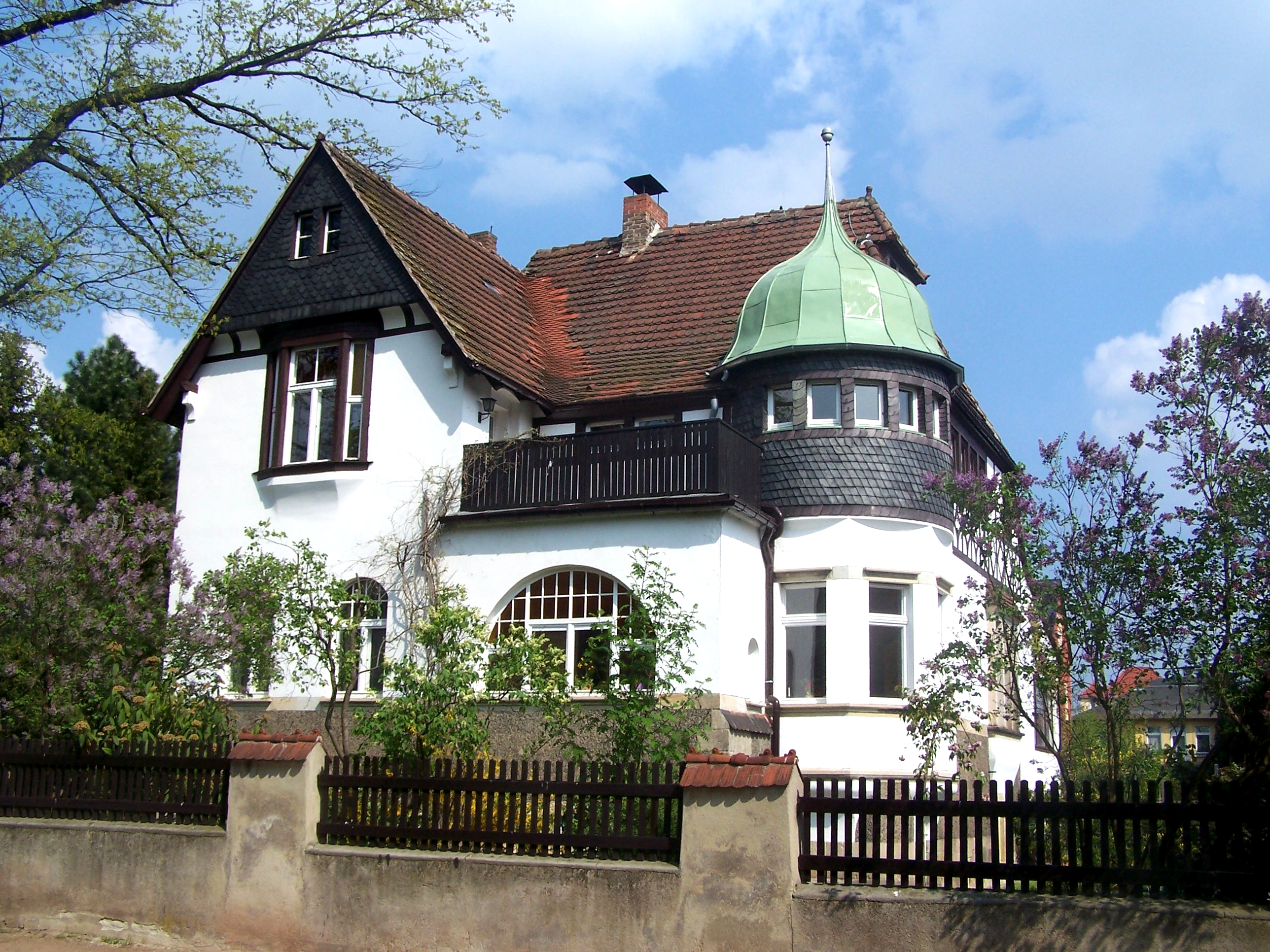 Wasastr. 64 in Radebeul